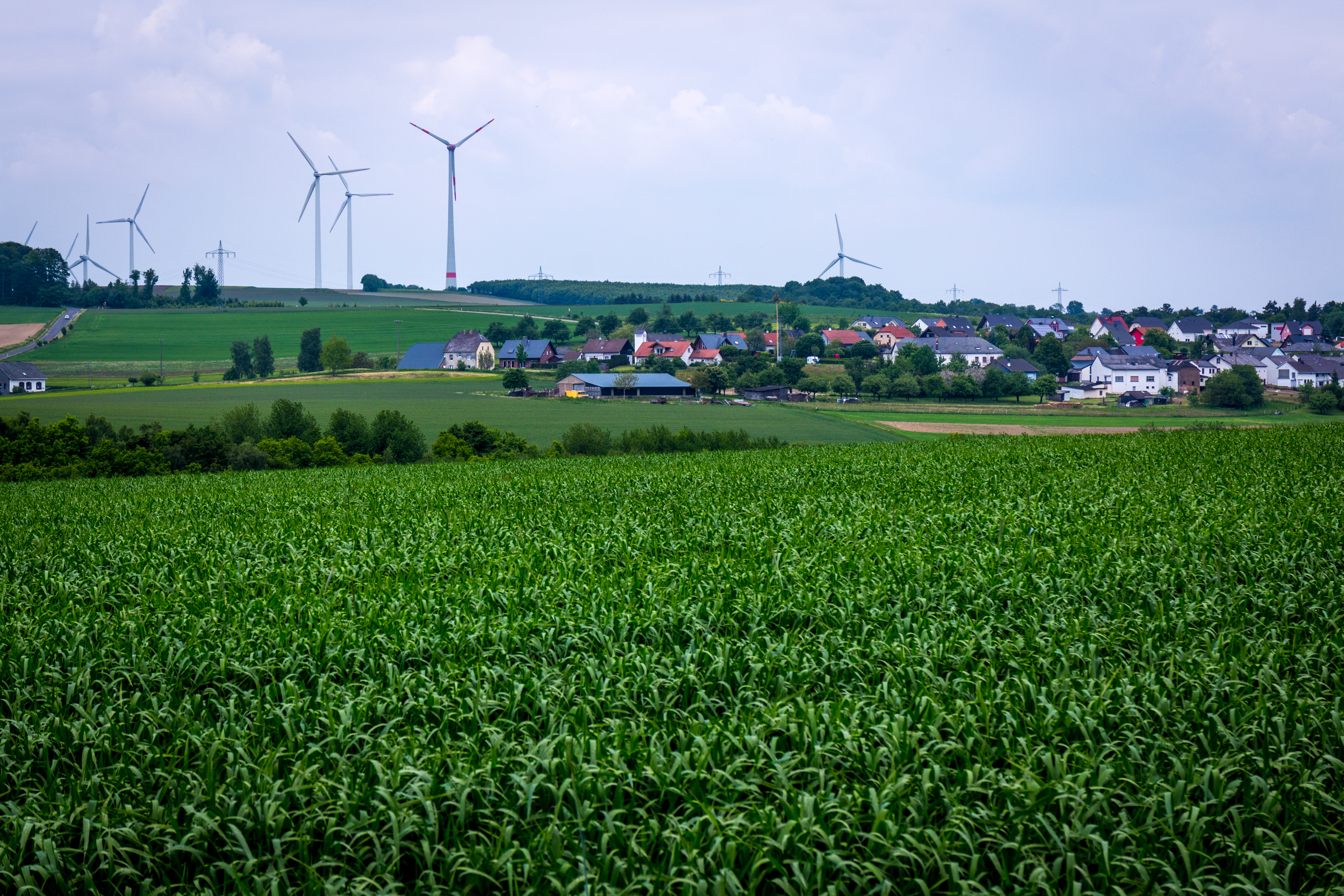 Naturpark Saar-Hunsrück, Zerf Heltern Feld, Dorf Paschel, Windräder